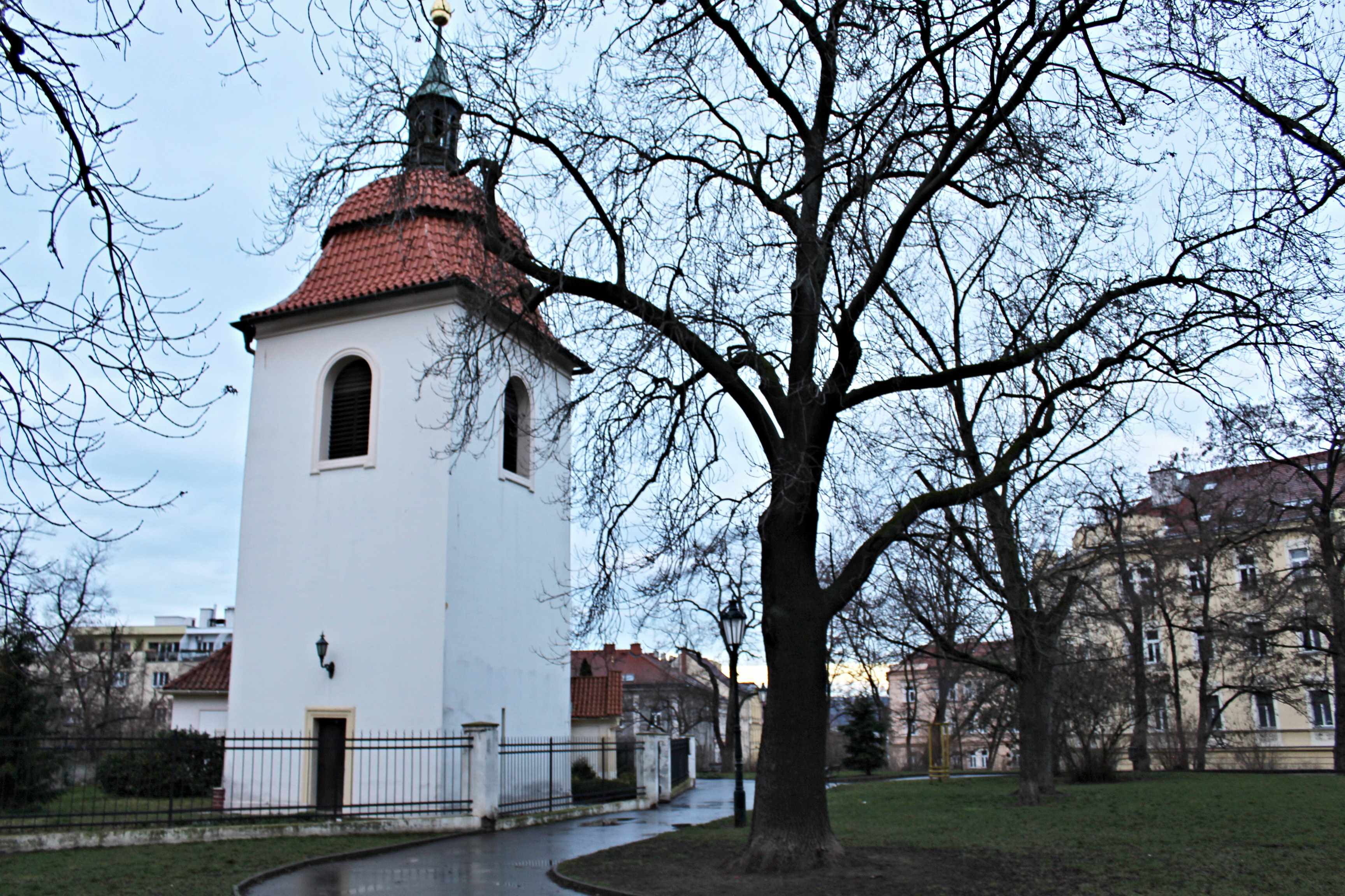 Pankrác - kostel sv. Pankráce